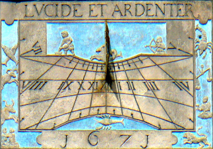 Zonnewijzer op de watertoren abdij van Rolduc in Kerkrade